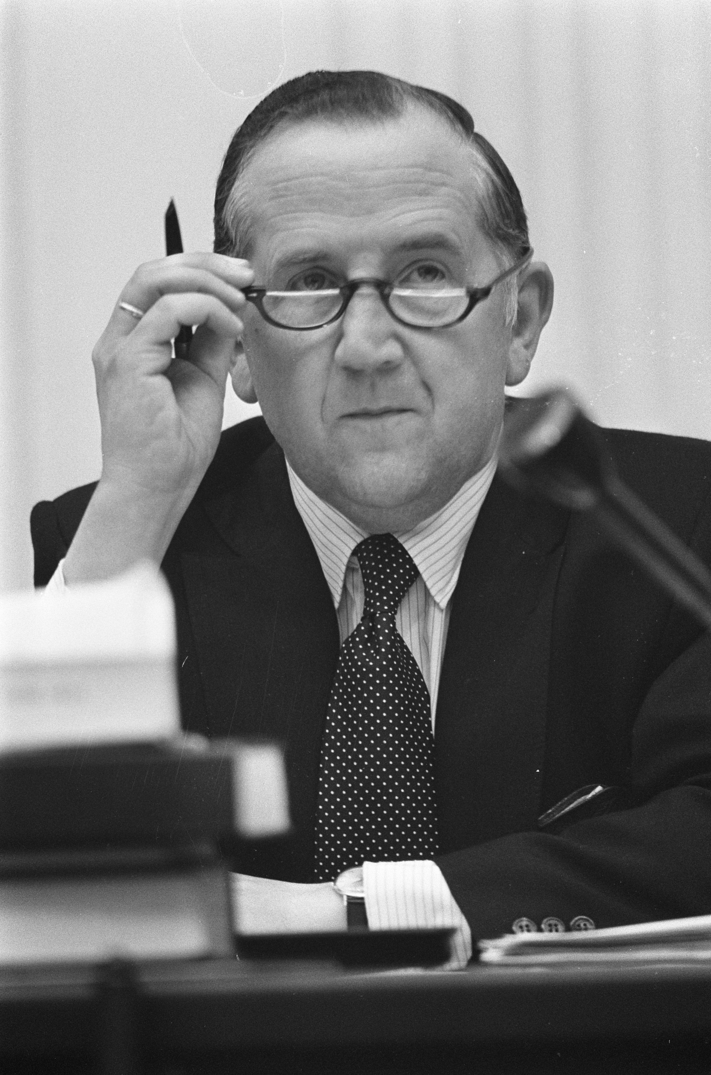 Collectie / Archief : Fotocollectie Anefo Reportage / Serie : [ onbekend ] Beschrijving : Debat over verhoging schoolgelden in de Tweede Kamer, Minister Van Veen Datum : 17 oktober 1972 Locatie : Den Haag, Zuid-Holland Trefwoorden : lesgelden, ministers, parlementaire debatten, politiek Persoonsnaam : Veen, Chris van Fotograaf : Mieremet, Rob / Anefo Auteursrechthebbende : Nationaal Archief Materiaalsoort : Negatief (zwart/wit) Nummer archiefinventaris : bekijk toegang 2.24.01.05 Bestanddeelnummer : 925-9548